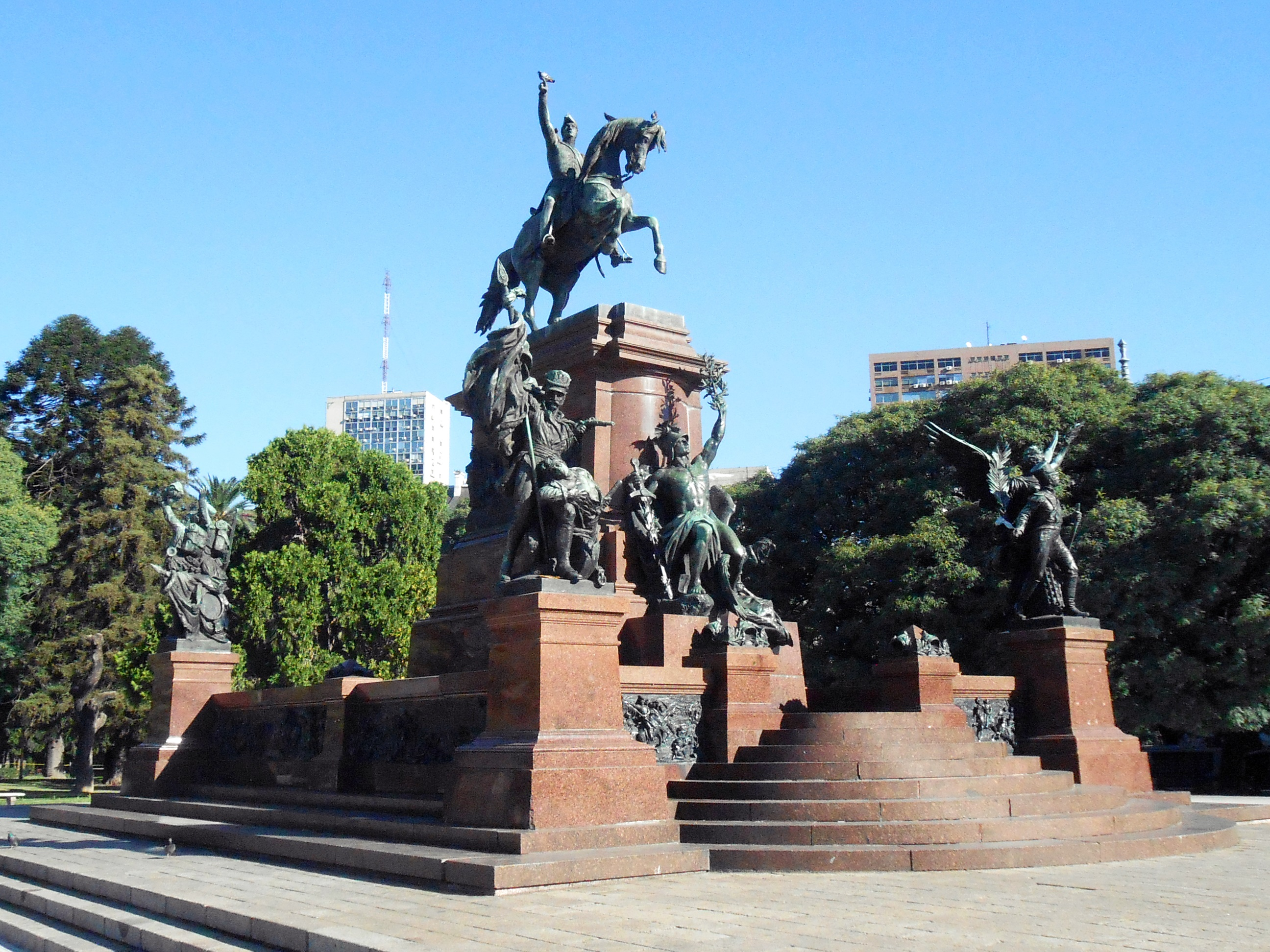 Equestrian statue of José de San Martín, in the homonymous park in Retiro, Buenos Aires, Argentina.